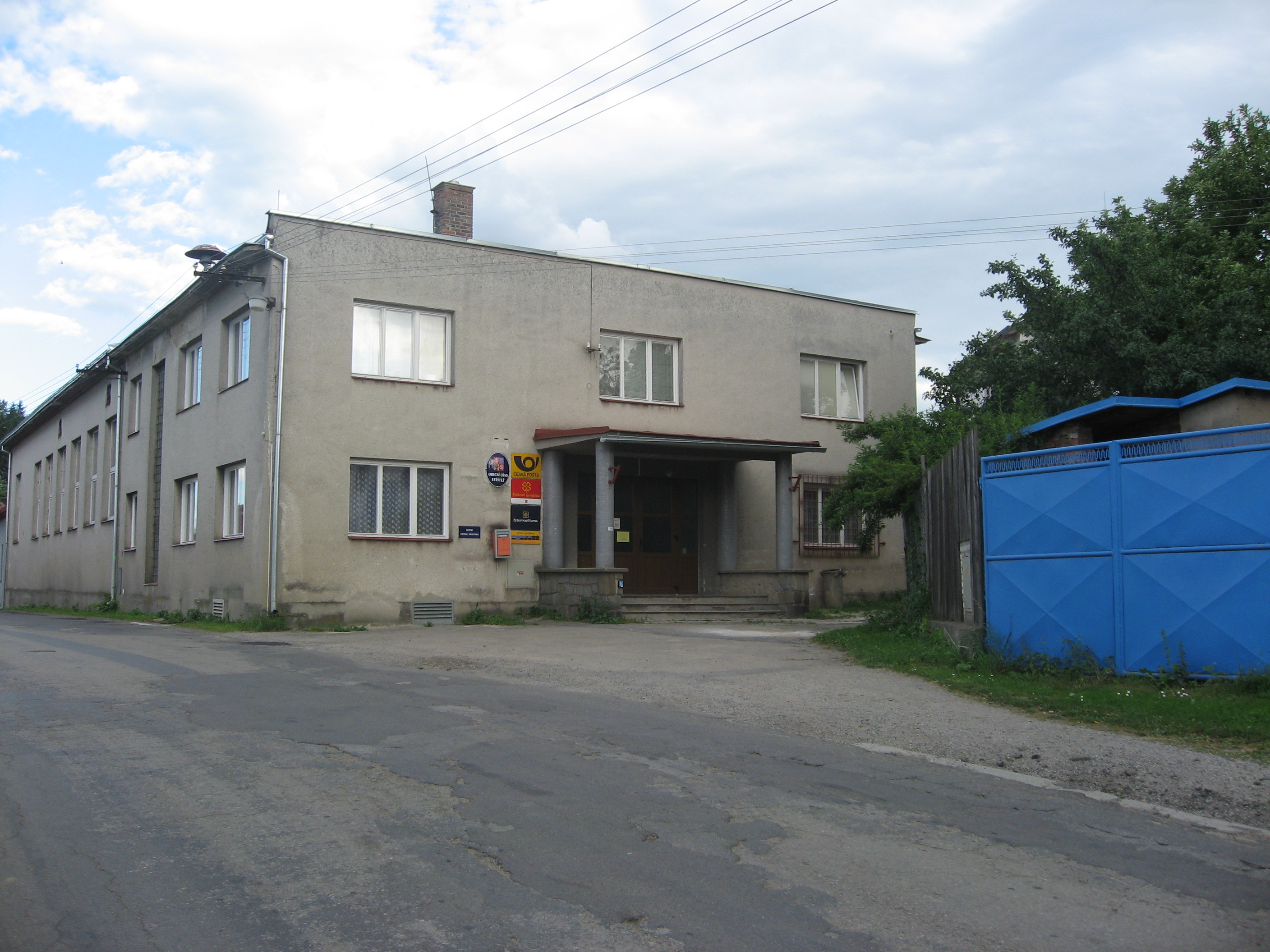 Střítež, obecní úřad a pošta